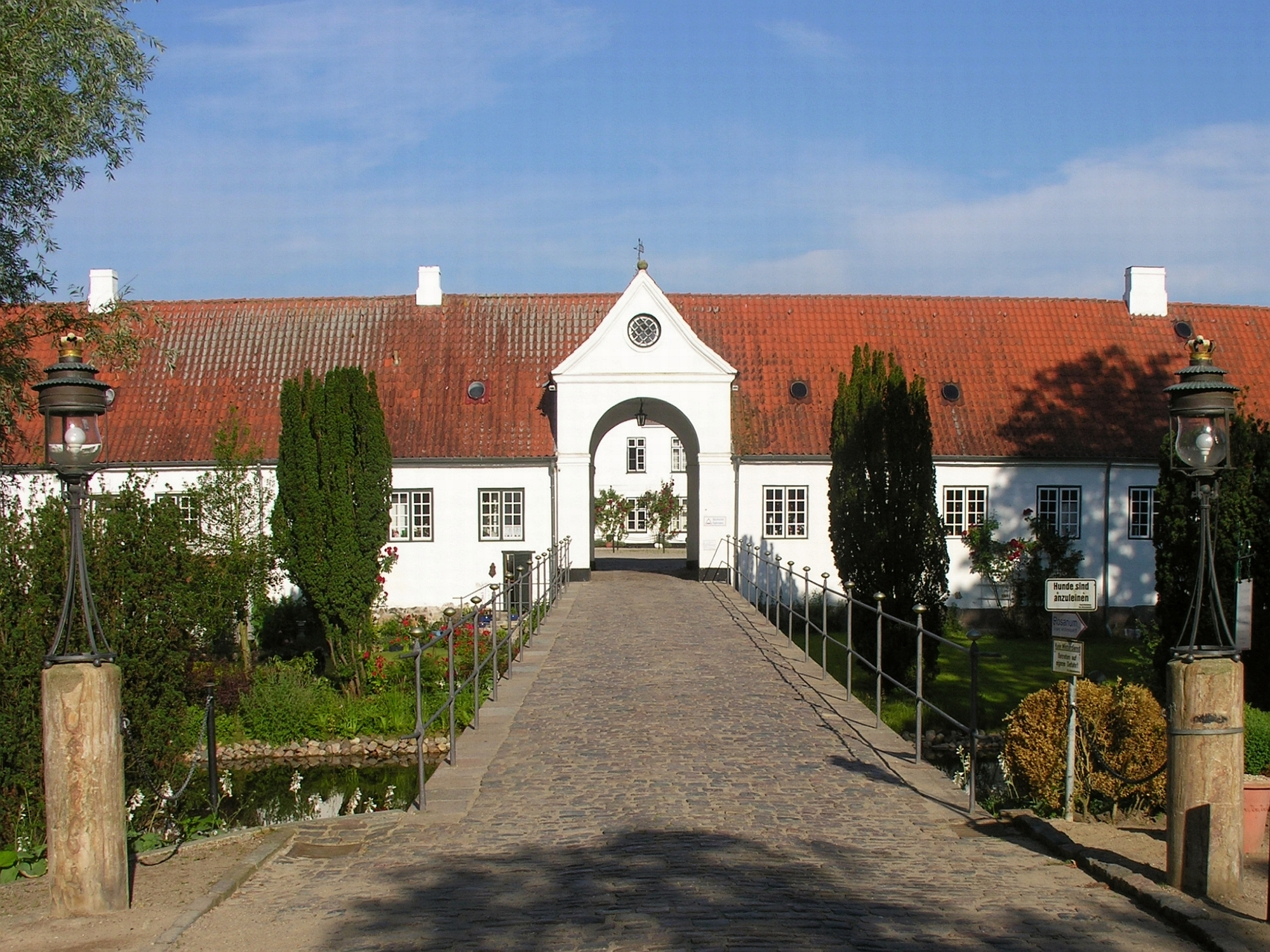 Kulturdenkmal 4.4 Zufahrt Brücke Geländer zum Torhaus und Wirtschaftshof von Schloss Glücksburg - Schleswig-Holstein Foto 2012 Wolfgang Pehlemann Steinberg/Ostsee DSCN0198